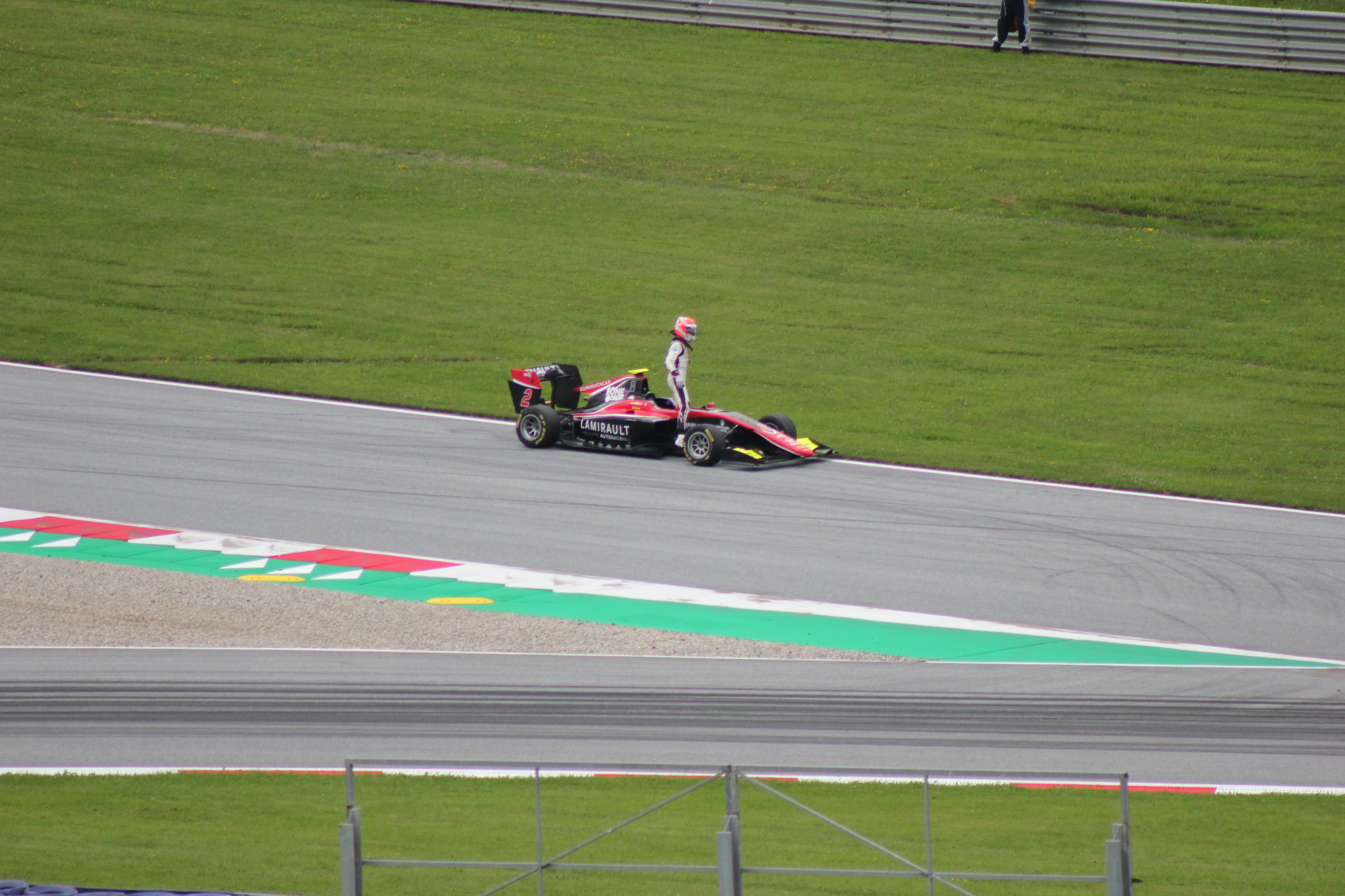 Anthoine Hubert bleibt während des Qualifyings liegen